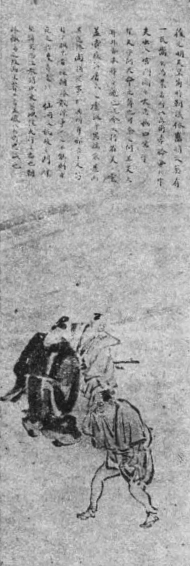 魚屋八兵衛図 峯山町毛呂清春氏蔵